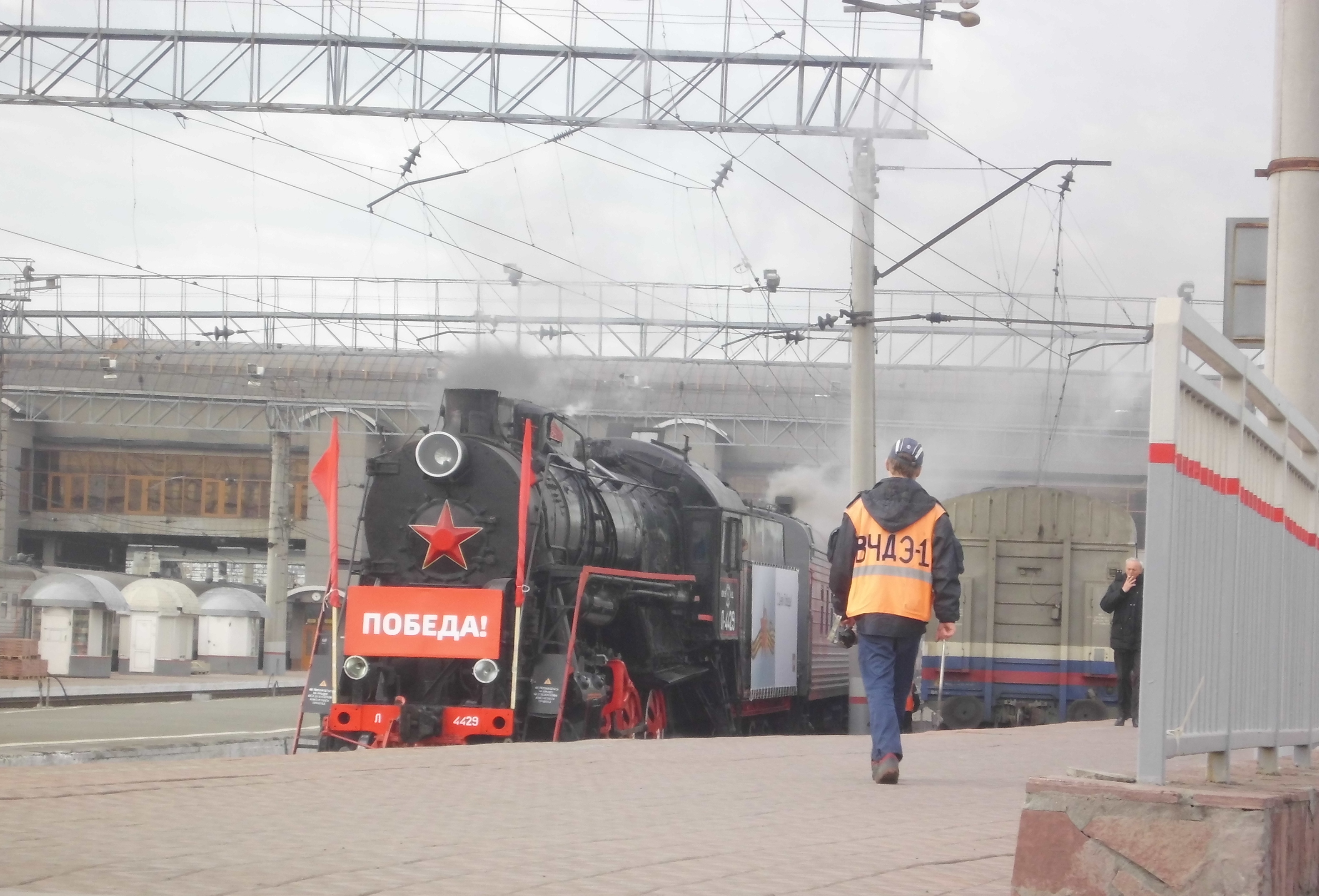 "Поезд Победы" ЮУЖД, посвящённый 72-летию победы в ВОВ. Станция Челябинск-Главный, 05 мая 2017 г. Перед следованием с ветеранами по маршруту до ст. Кыштым (около 100 км) и обратно. Паровоз Л-4429.